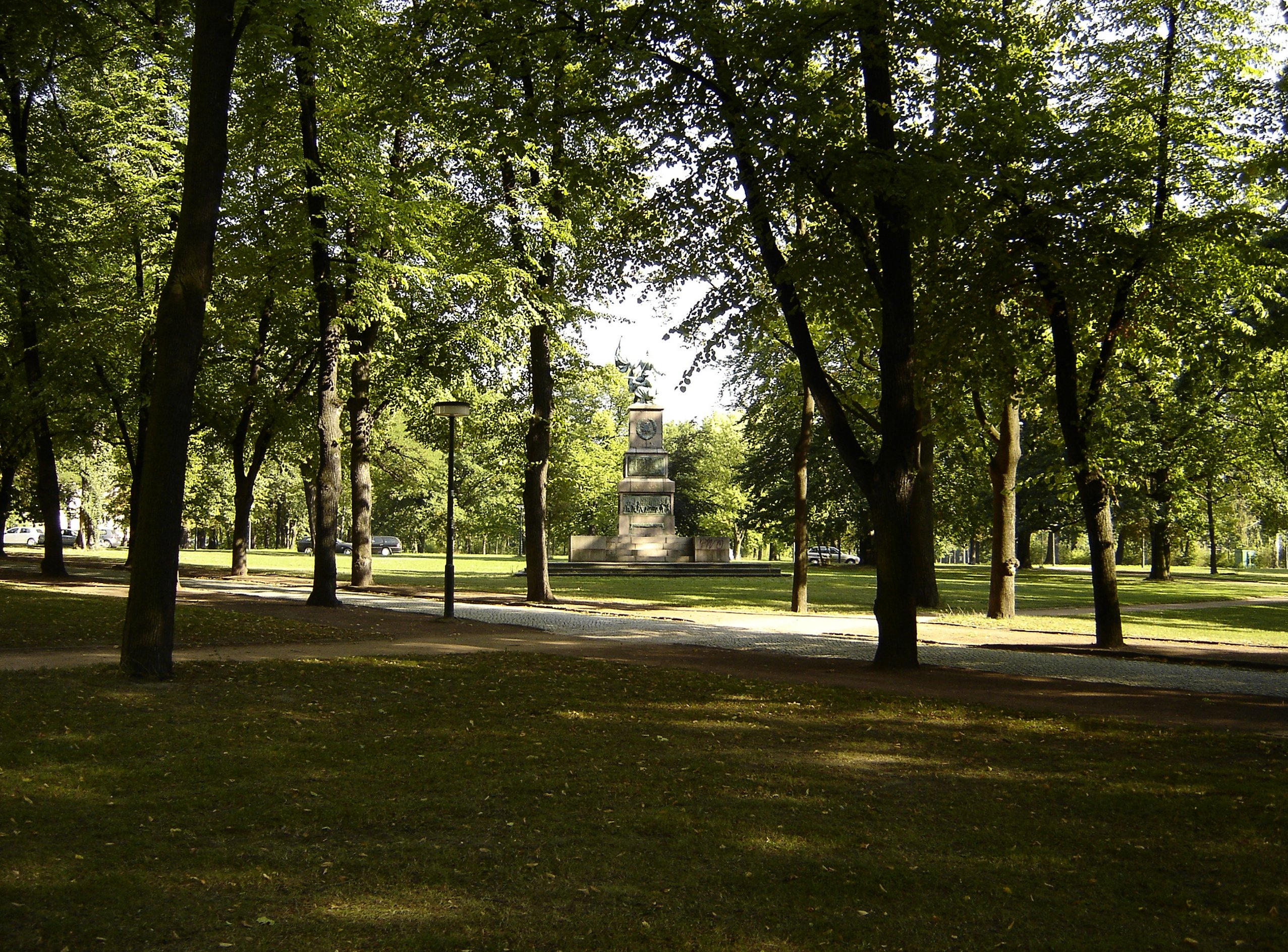 Olbrichtplatz in Dresden-Albertstadt